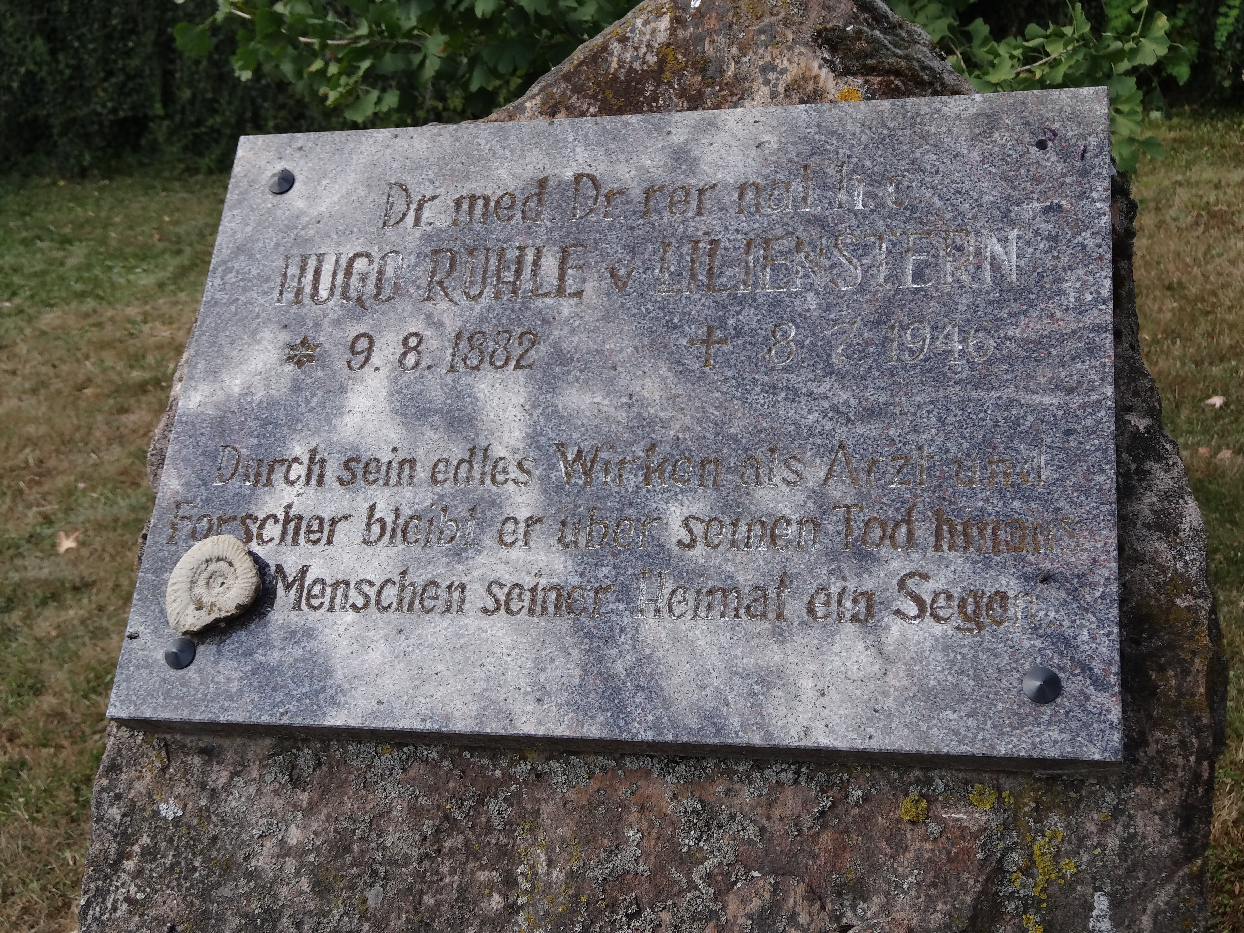 Schlosspark Bedheim, Thüringen